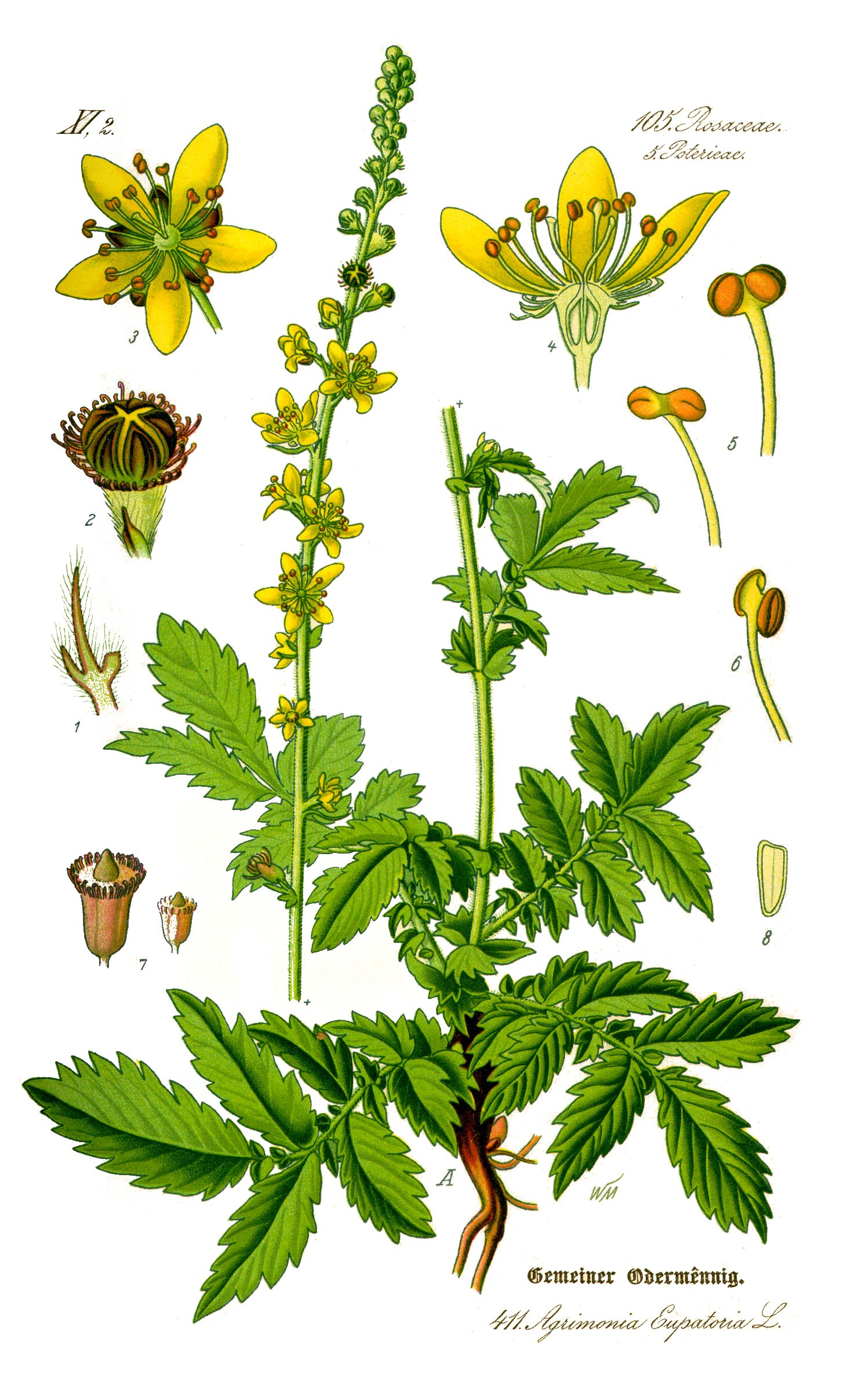 Name Agrimonia eupatoria Family Rosaceae